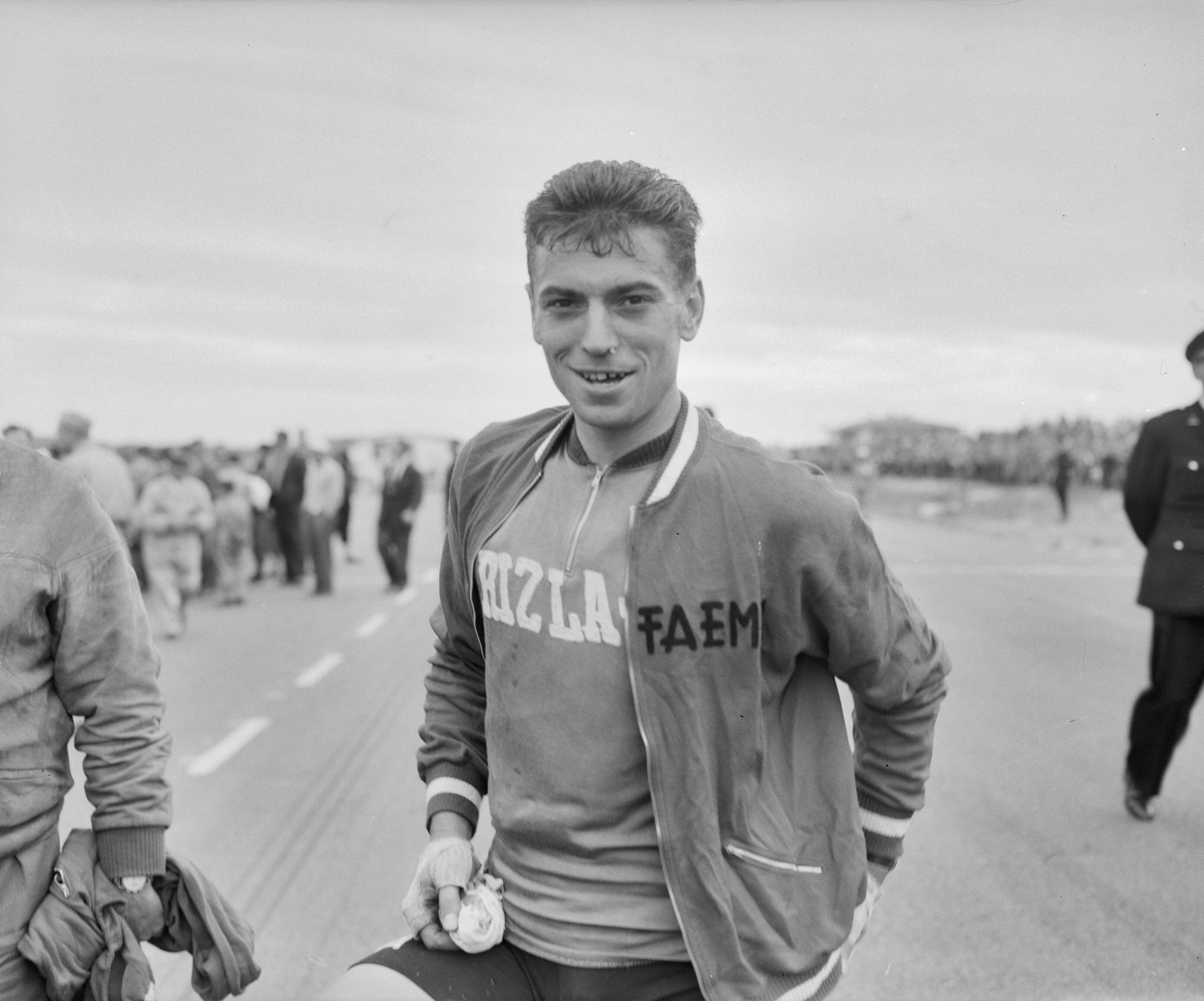 Collectie / Archief : Fotocollectie Anefo Reportage / Serie : [ onbekend ] Beschrijving : Derde etappe Ronde van Nederland. Rick Van Looy winnaar derde etappe. Finish op het circuit Zandvoort Datum : 8 augustus 1956 Locatie : Noord-Holland, Zandvoort Trefwoorden : portretten, wielrennen, wielrenners Persoonsnaam : Looy, Rik van Fotograaf : Bilsen, Joop van / Anefo Auteursrechthebbende : Nationaal Archief Materiaalsoort : Negatief (zwart/wit) Nummer archiefinventaris : bekijk toegang 2.24.01.04 Bestanddeelnummer : 907-9363